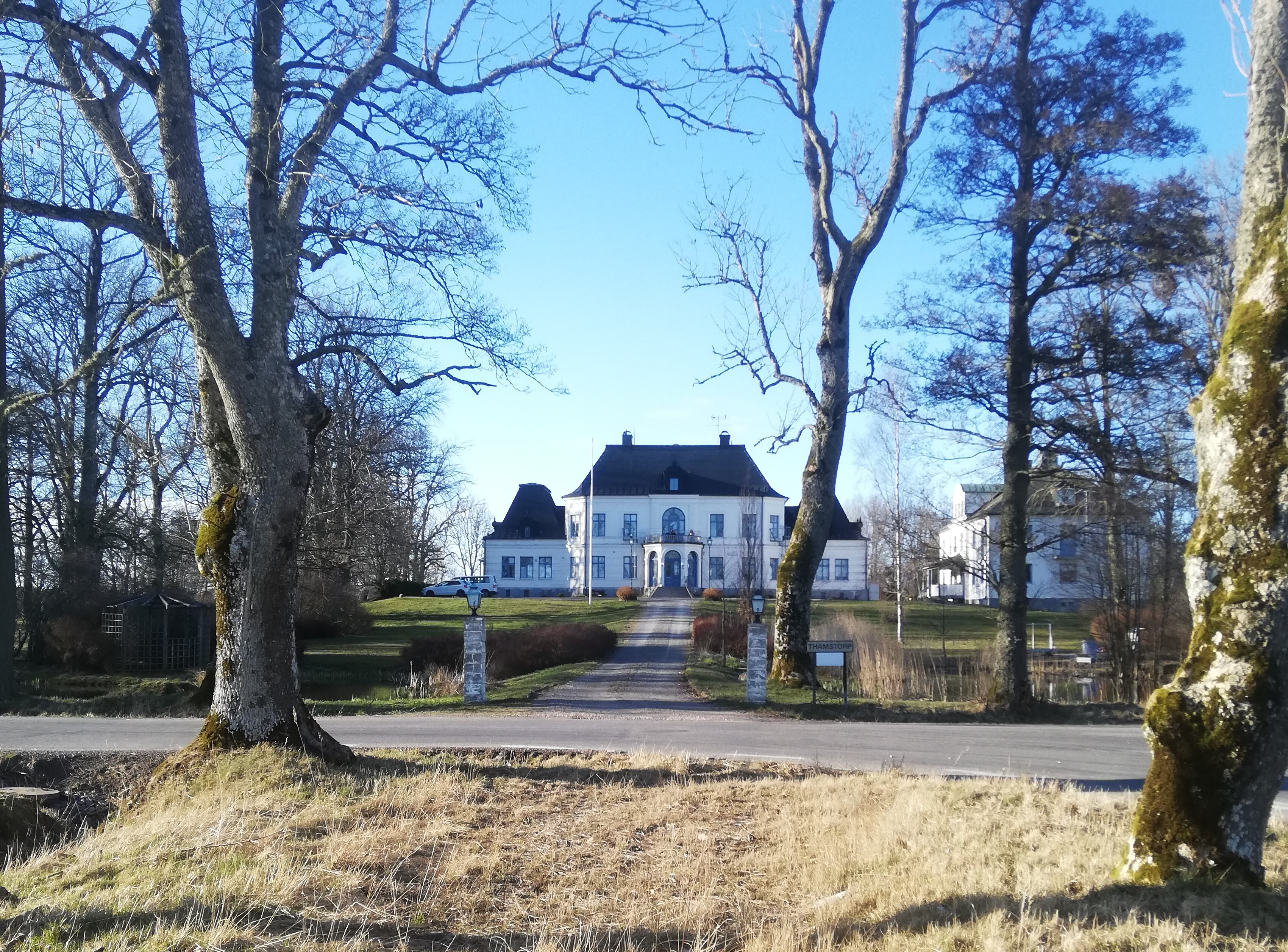 Thamstorps f.d. huvudbyggnad, numera vårdhem uppfört omkring år 1880. Flygelbyggnaden uppförd 1951 ursprungligen som personalbostäder.